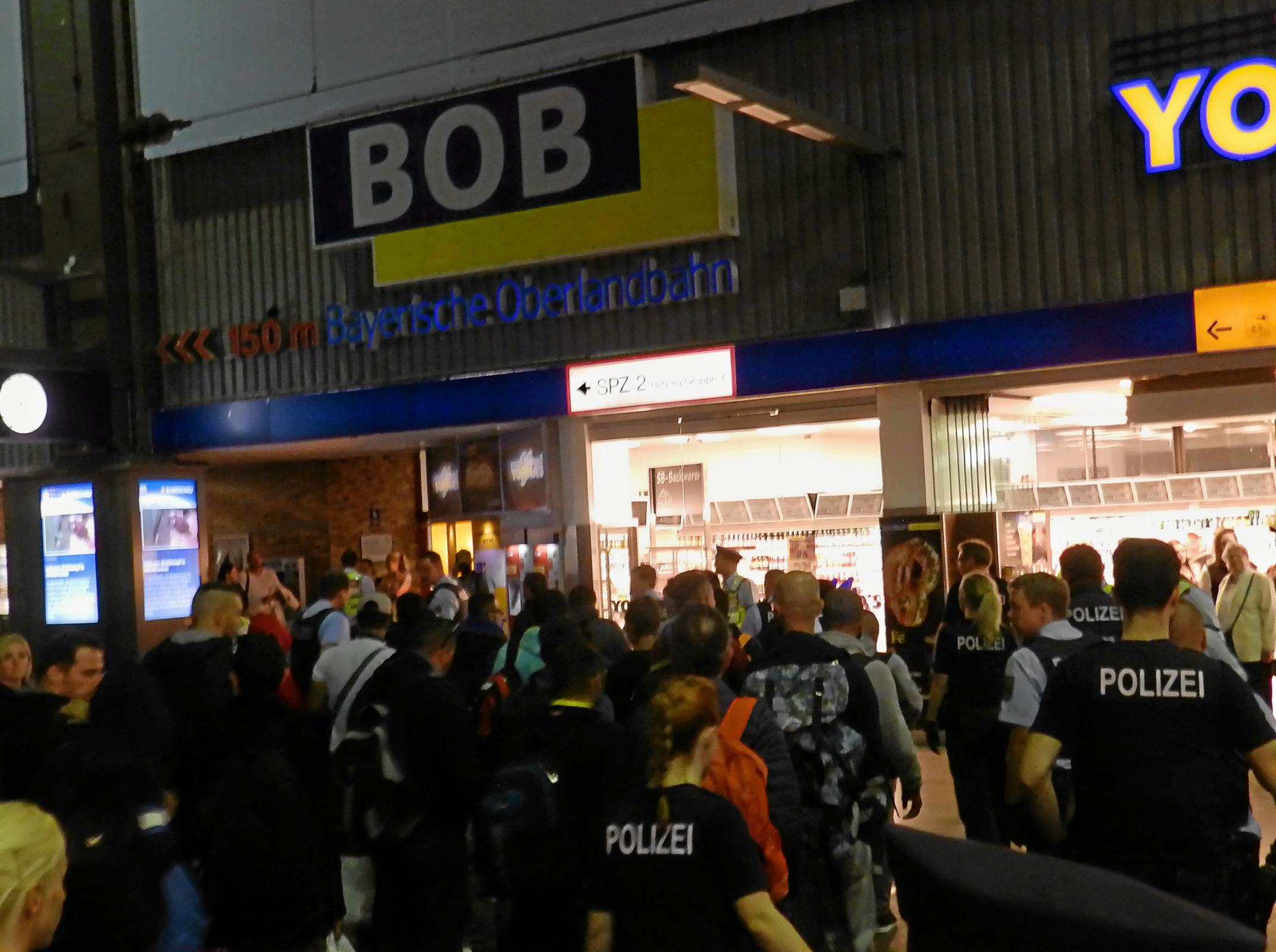 Flüchtlinge kurz nach der Ankunft am Münchner Hauptbahnhof am 12. September 2015.